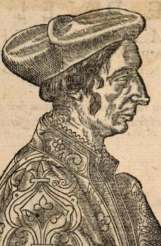 Jean Fernel (1497-1558)